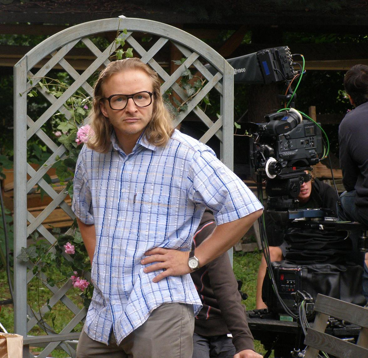 Łukasz Lewandowski na planie serialu "Ojciec Mateusz"